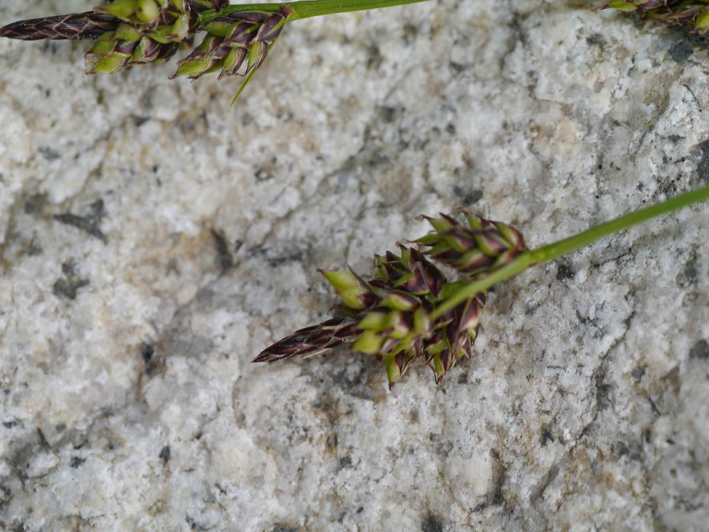 Carex oxyandra：ヒメスゲ 2018/05/04 滋賀県甲賀市：Kouga City, Siga Pref.